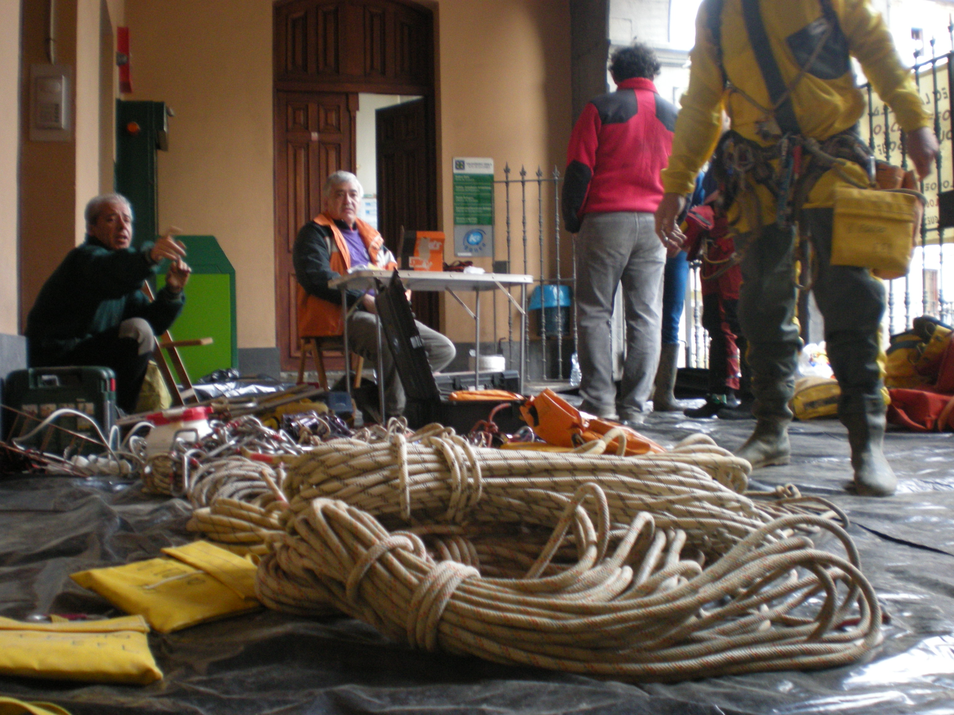 Euskal Espeleo Laguntza taldearen simulakro orokorra 2010ean (Artekonako leizea, Galdames, Bizkaia).